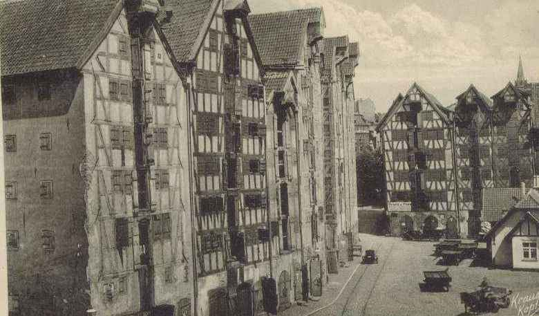 das alte Speicherviertel